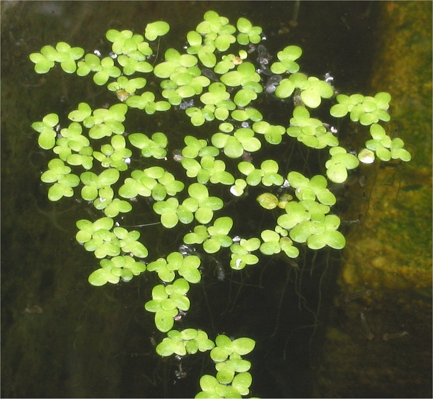 (Klein kroos) Lemna minor